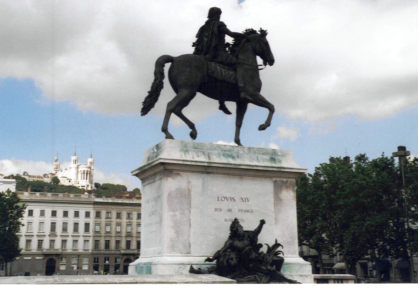 Statue de Louis XIV sur la place Bellecour à Lyon (France), avec vue sur la Basilique de Fourvière